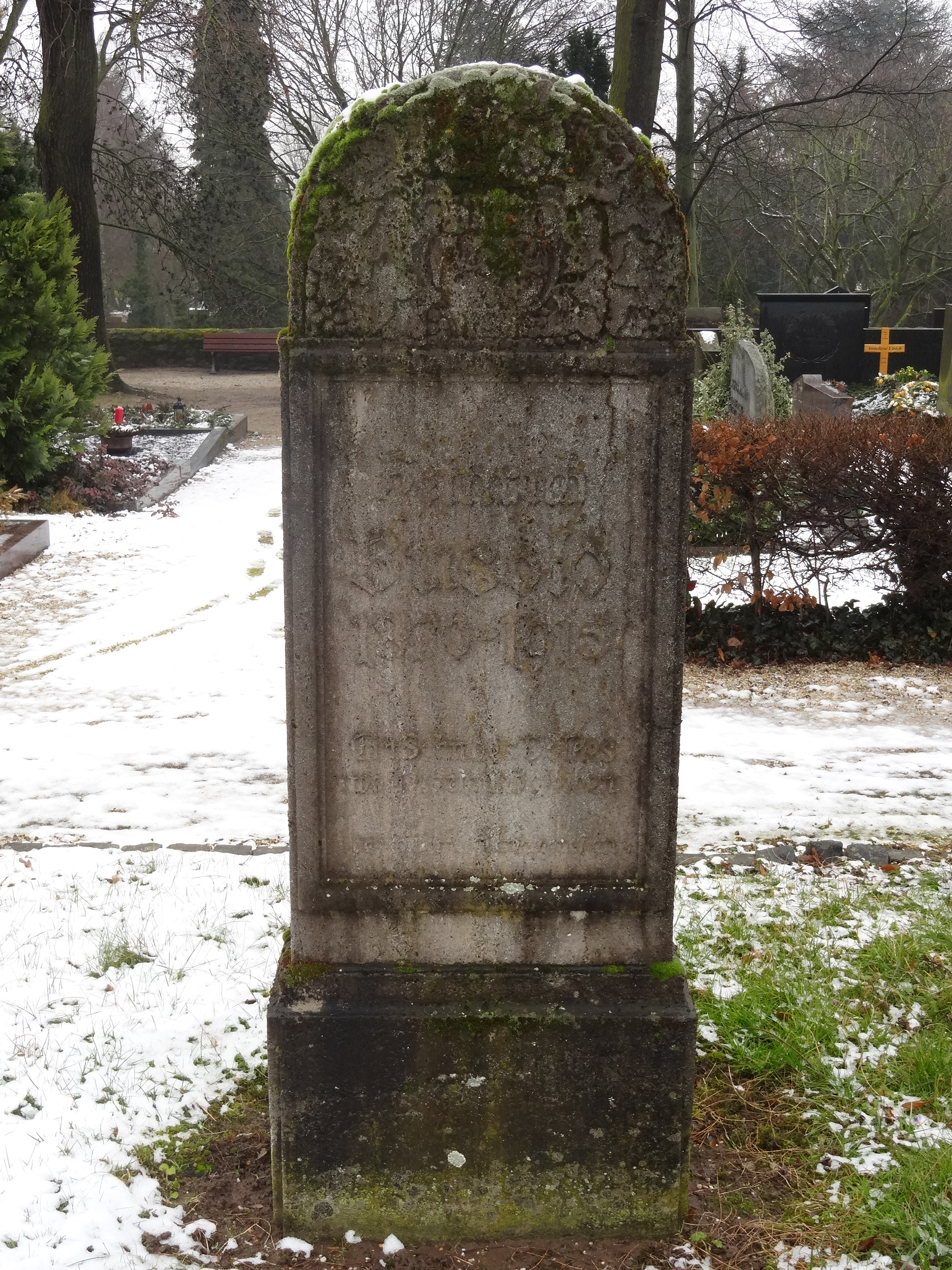 Hauptfriedhof Friedberg (Hessen)